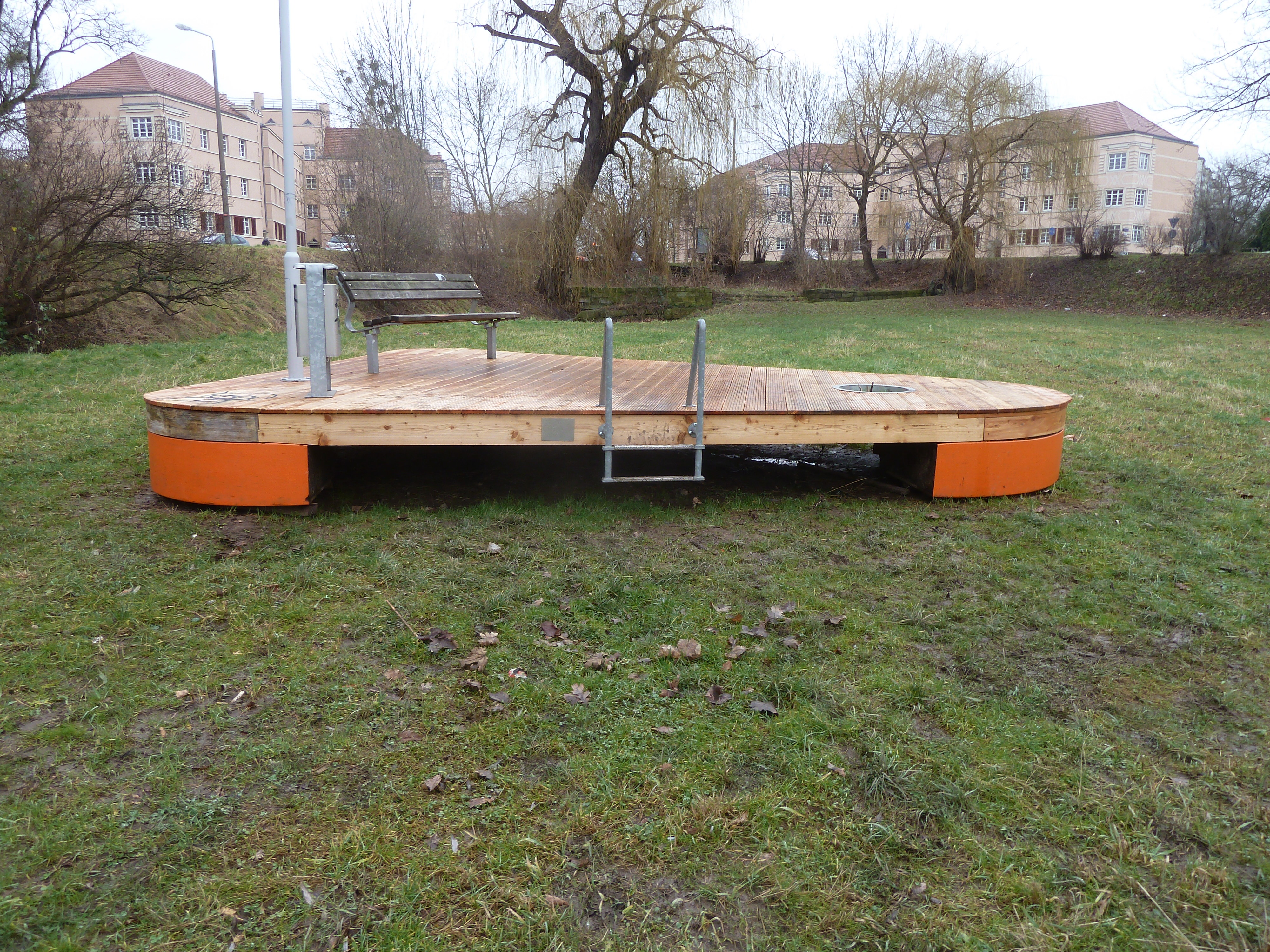 Eine der beiden schwimmfähigen Plattformen des Kunstwerks „Parkmöbel am Kaitzbach“ im Hugo-Bürkner-Park im Dresdner Stadtteil Strehlen